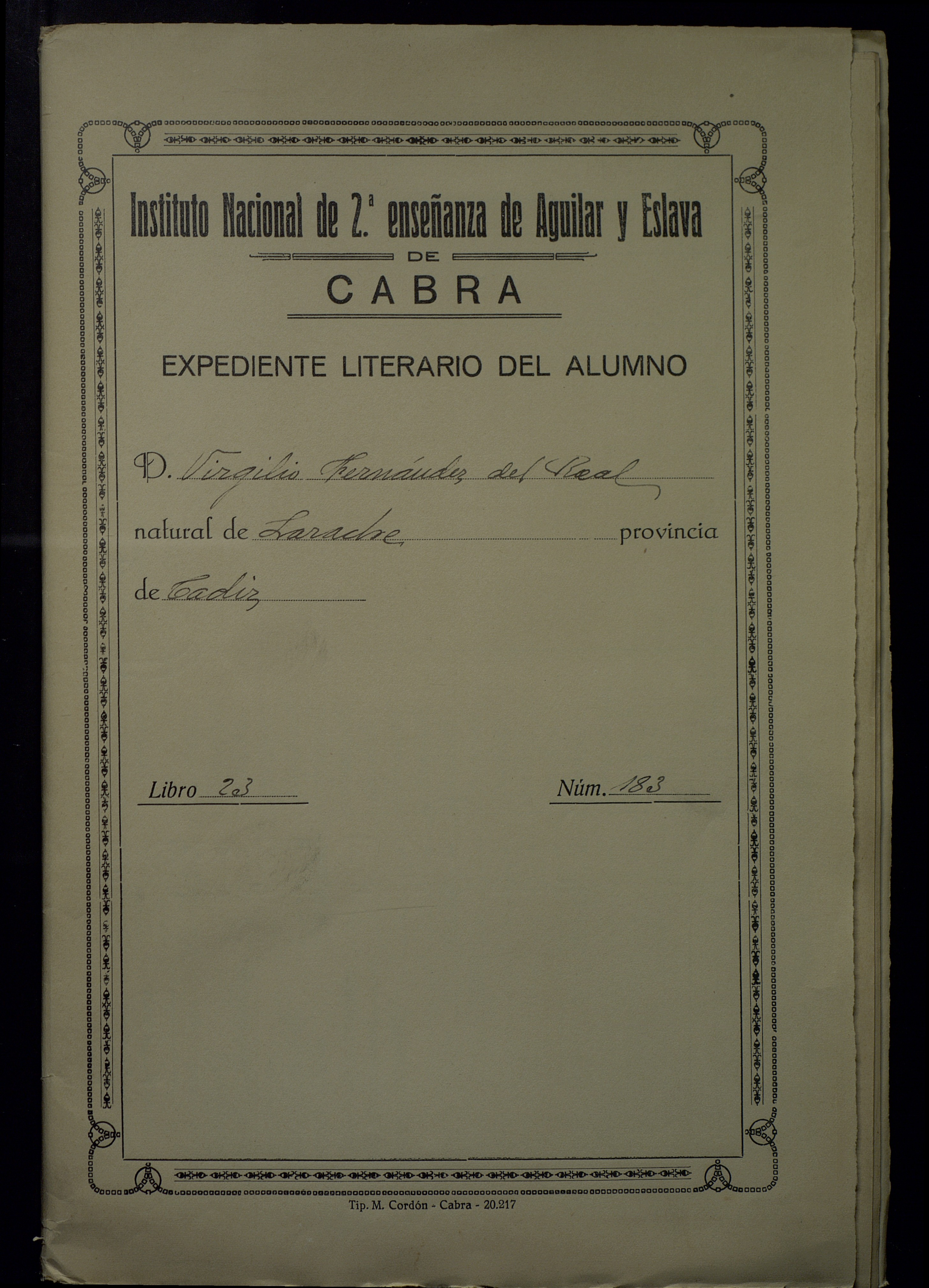 Expediente académico (literario) del alumno Virgilio Fernández del Real en el Instituto Aguilar y Eslava de Cabra (Córdoba)